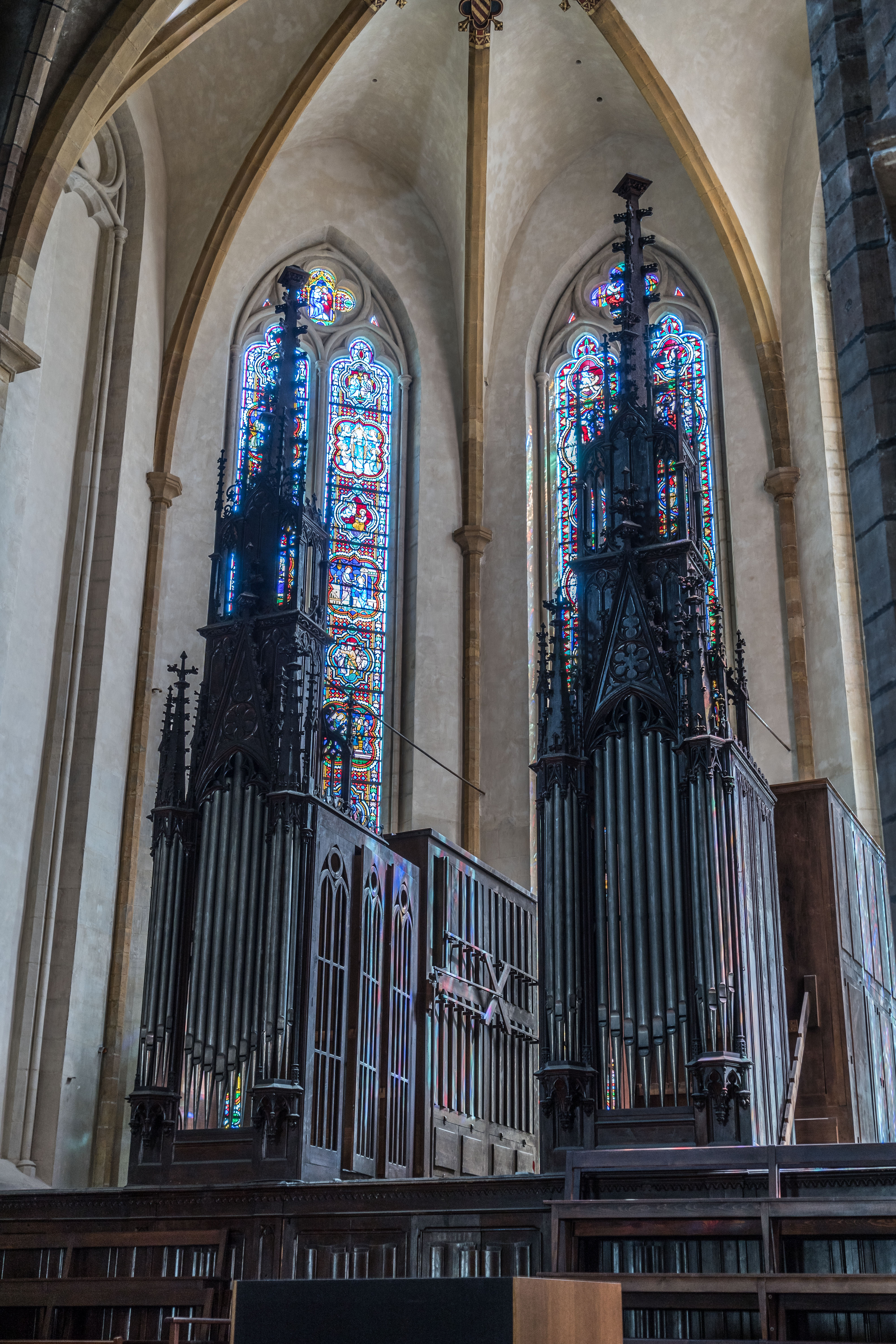 Lyon - église Saint-Bonaventure - Orgues